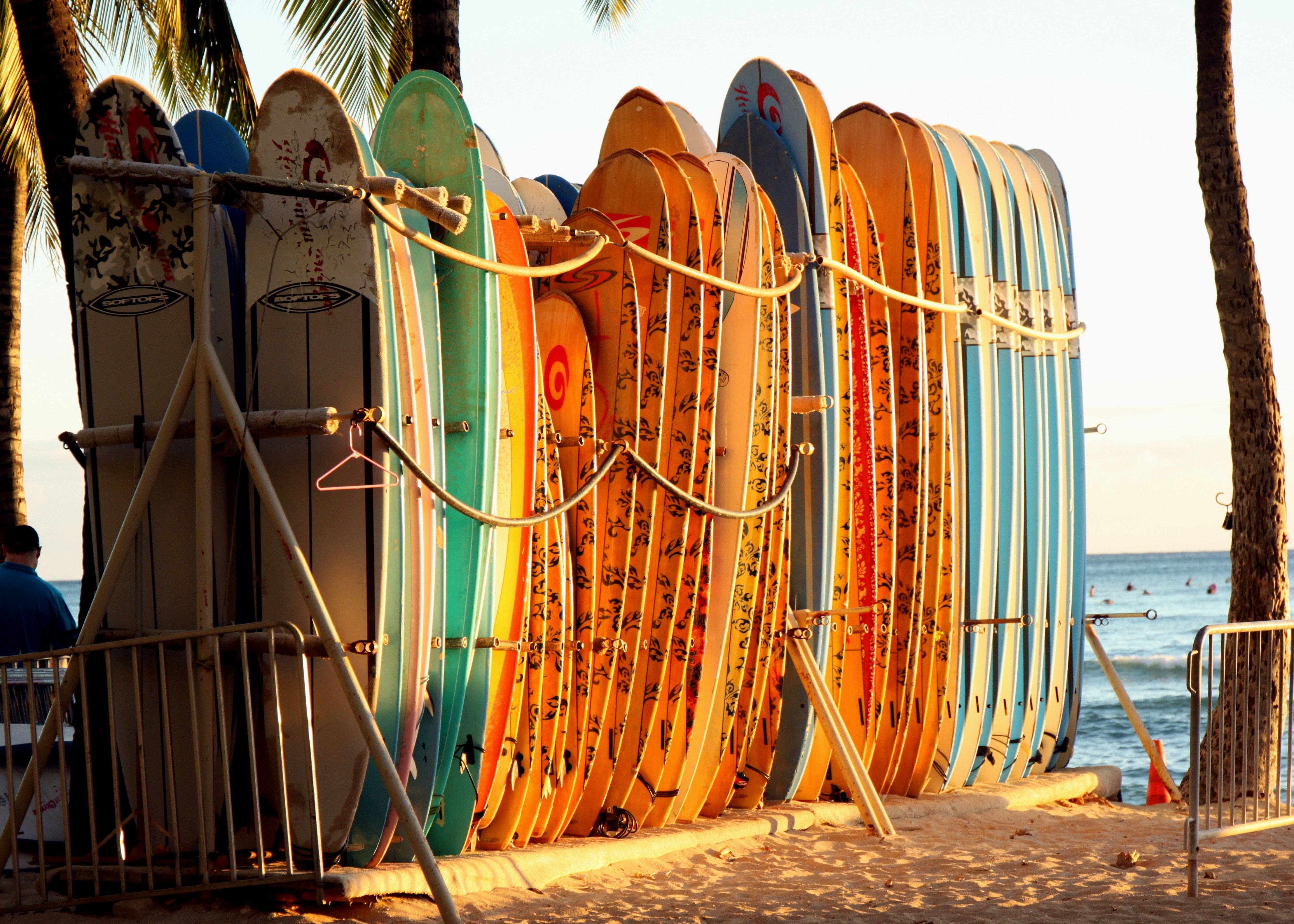 Honolulu, Hawai'i